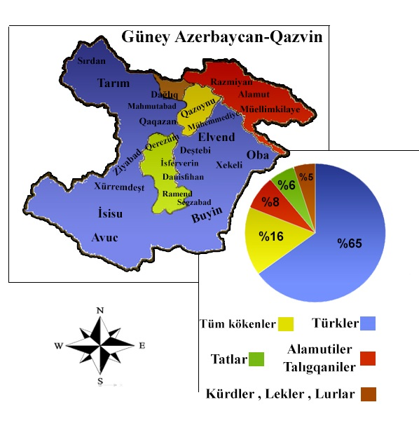 تۆرکجه: ایران آزربایجانی‌نین (گونیئ آزربایجان) قزوین اوستانی‌نین ائتنیک قوروپلاری؛ تورک، تات، لور، الموتلی طالقانلی